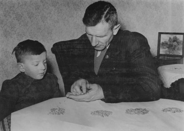 Löbersdorf, Bauer mit seinem Sohn 1.2.1952 Meisterbauer Schimke aus Löbersdorf bei Bitterfeld UBz: Auch sein Sohn interssiert sichfür die Versuche, mit verschiedenen Getreidesorten.